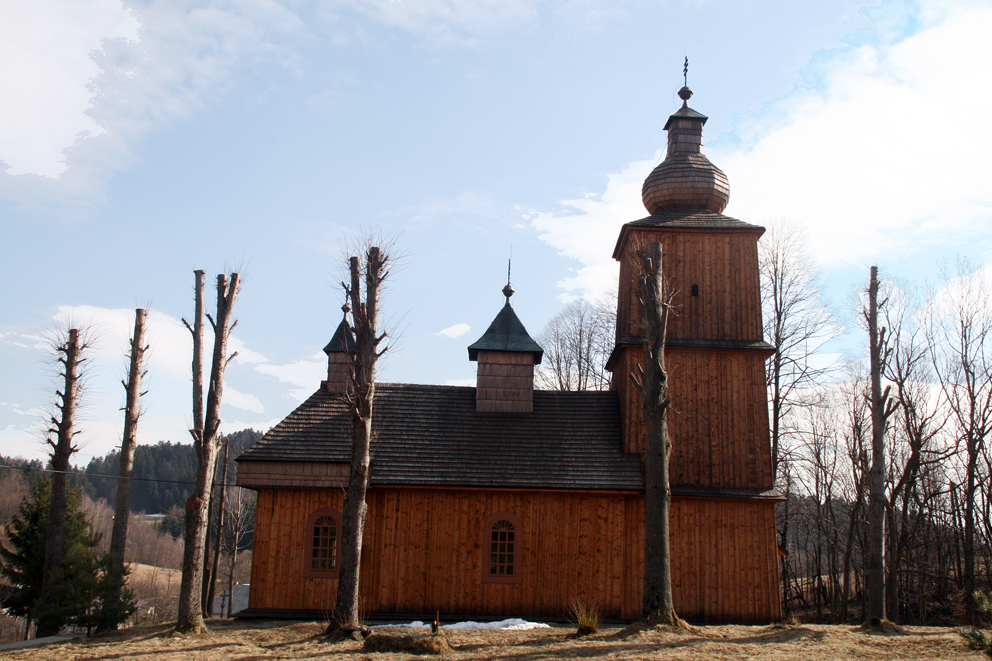 Narodná kultúrna pamiatka vo Vyšnom Komárniku